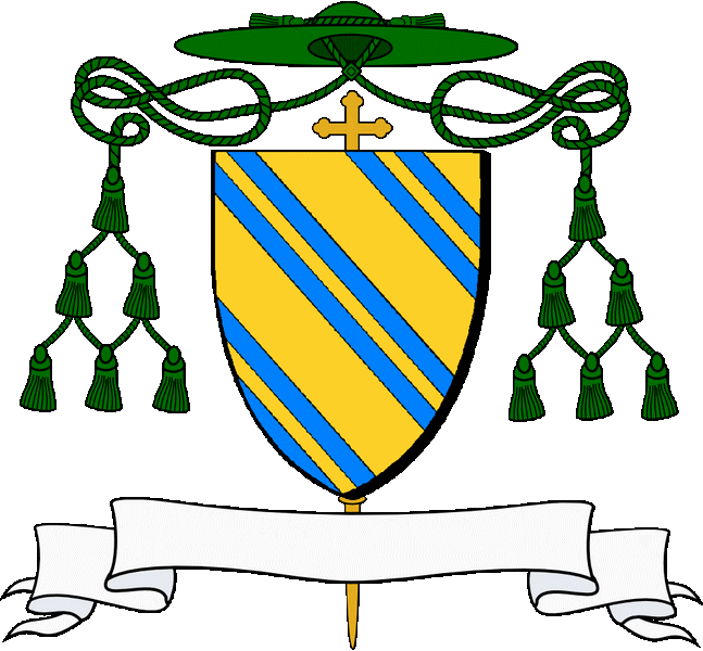 En aour e deir eilenn en glazur sourinet